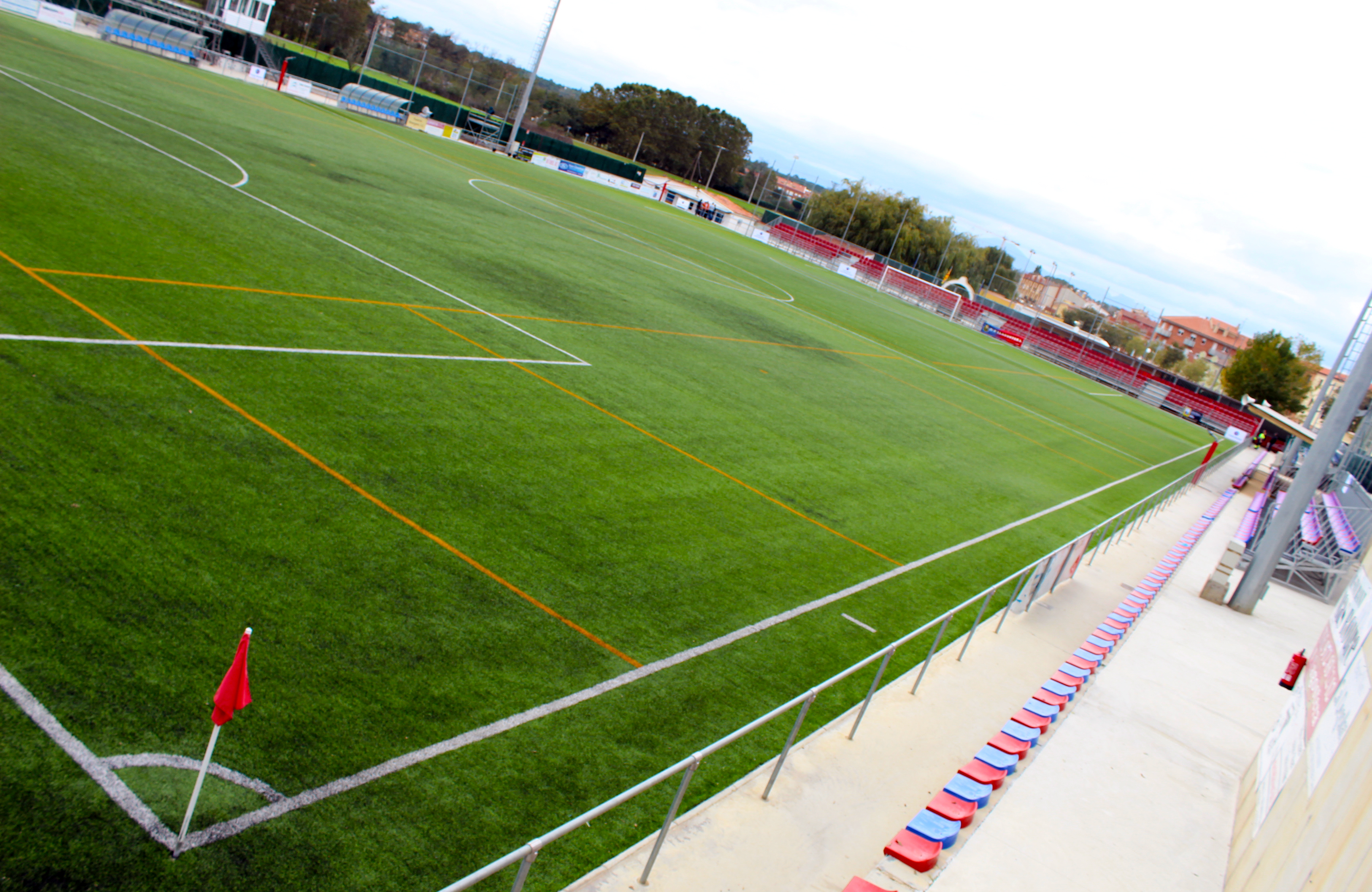 Camp Municipal de Llagostera, preparat per al partit de la copa del Rei Llagostera-València dels setzens de final de la Copa del Rei del 2012 al Municipal de Llagostera.